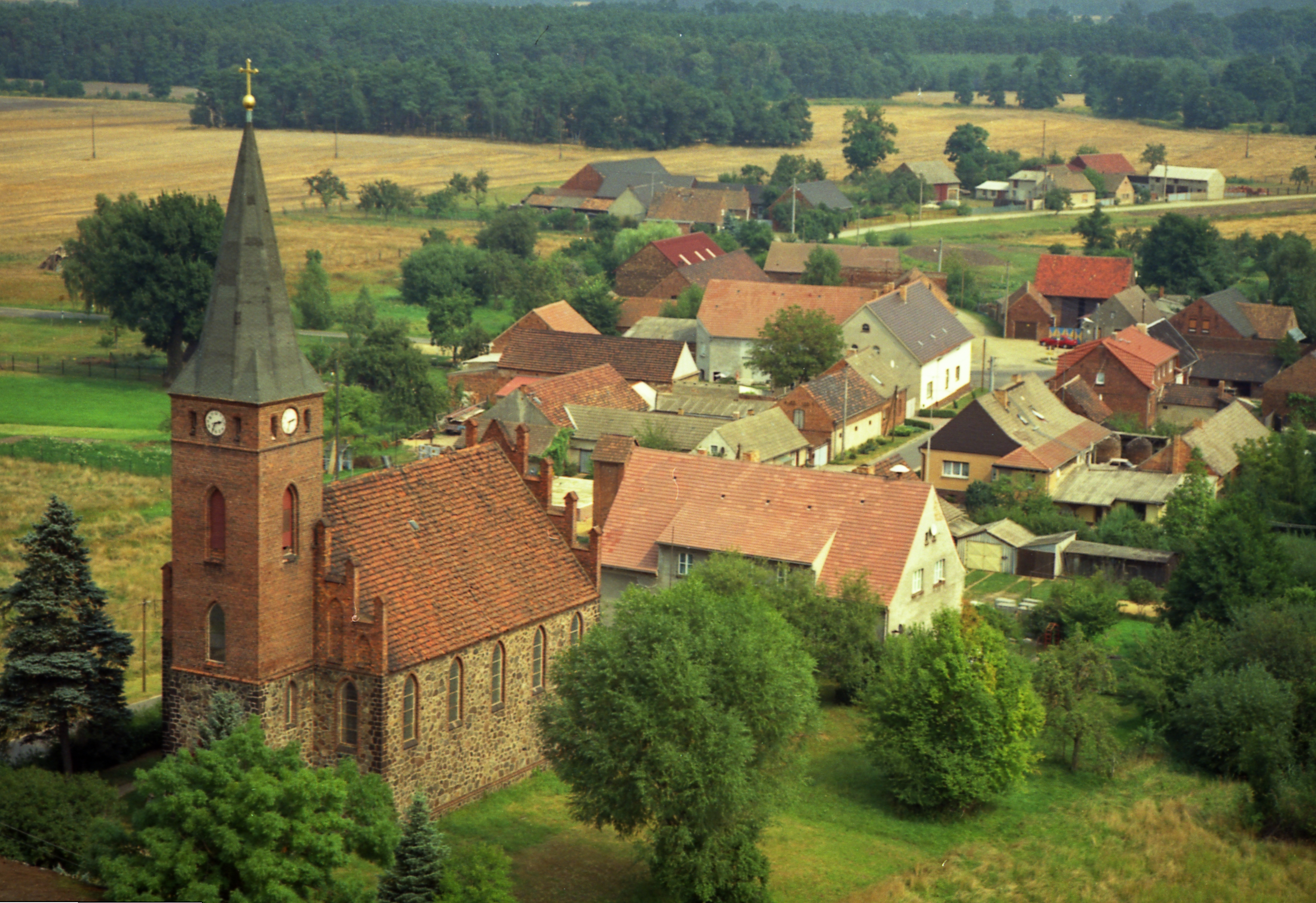 Östlicher Ortsteil. Foto Rainer Kamenz